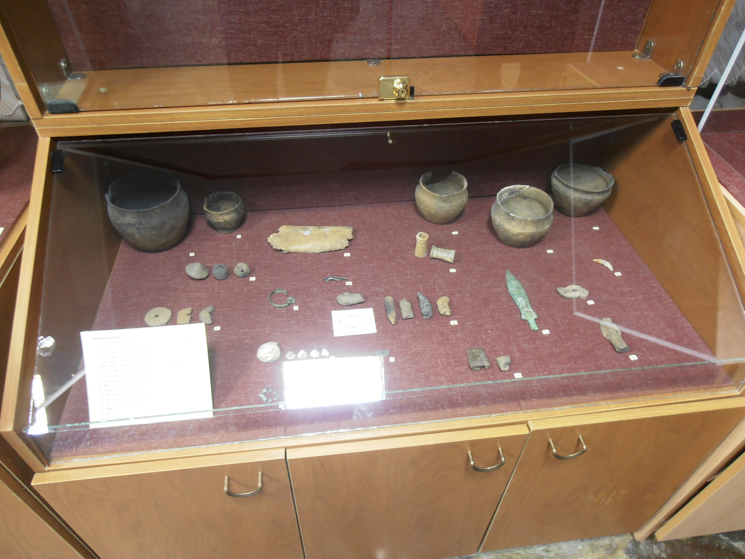 Артефакты андроновской культуры (бронзовый век). Ингальская долина. Экспонат зала археологии Музея археологии и этнографии Тюменского государственного университета.